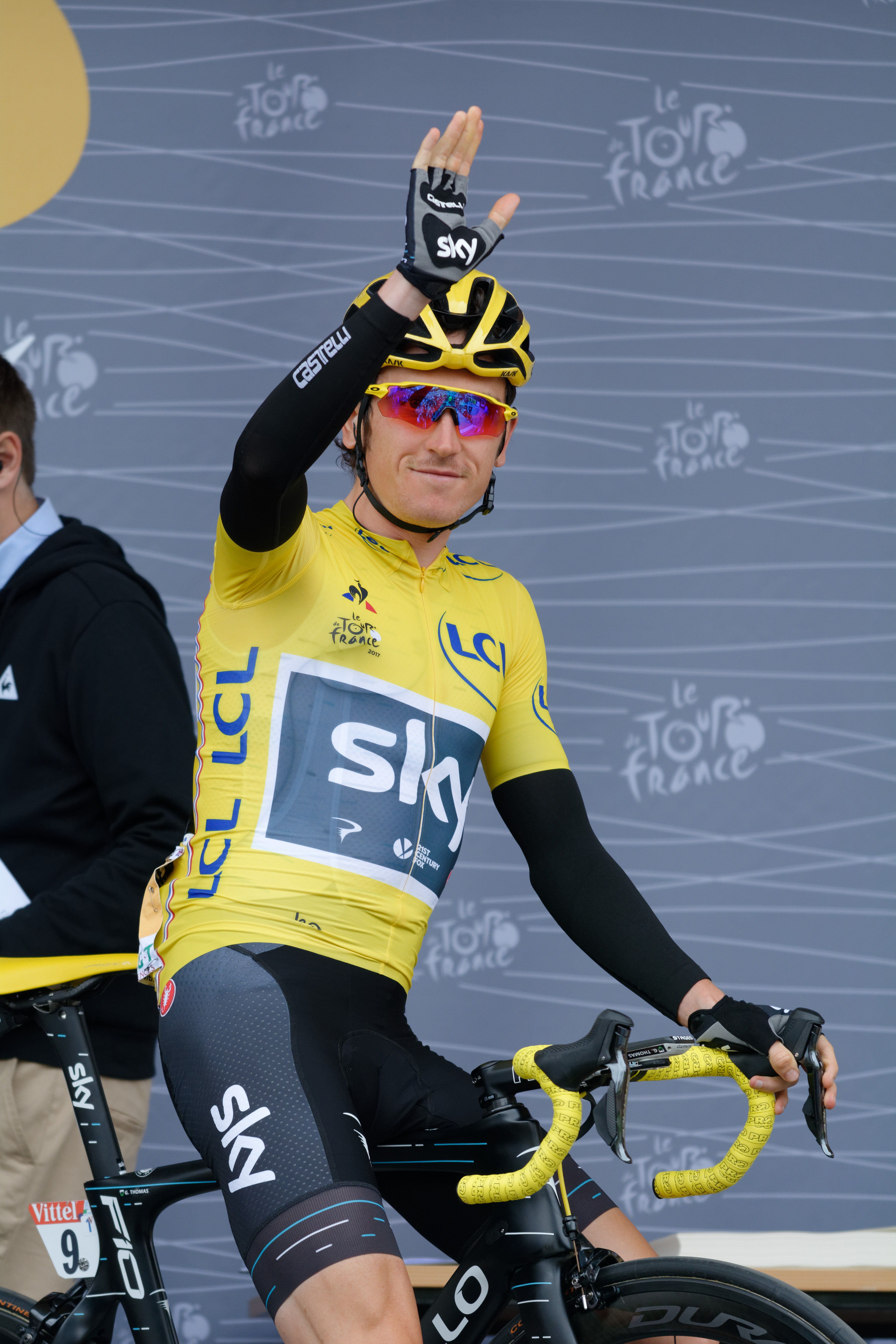 Tour de France 2017 Stage 2 Duesseldolf